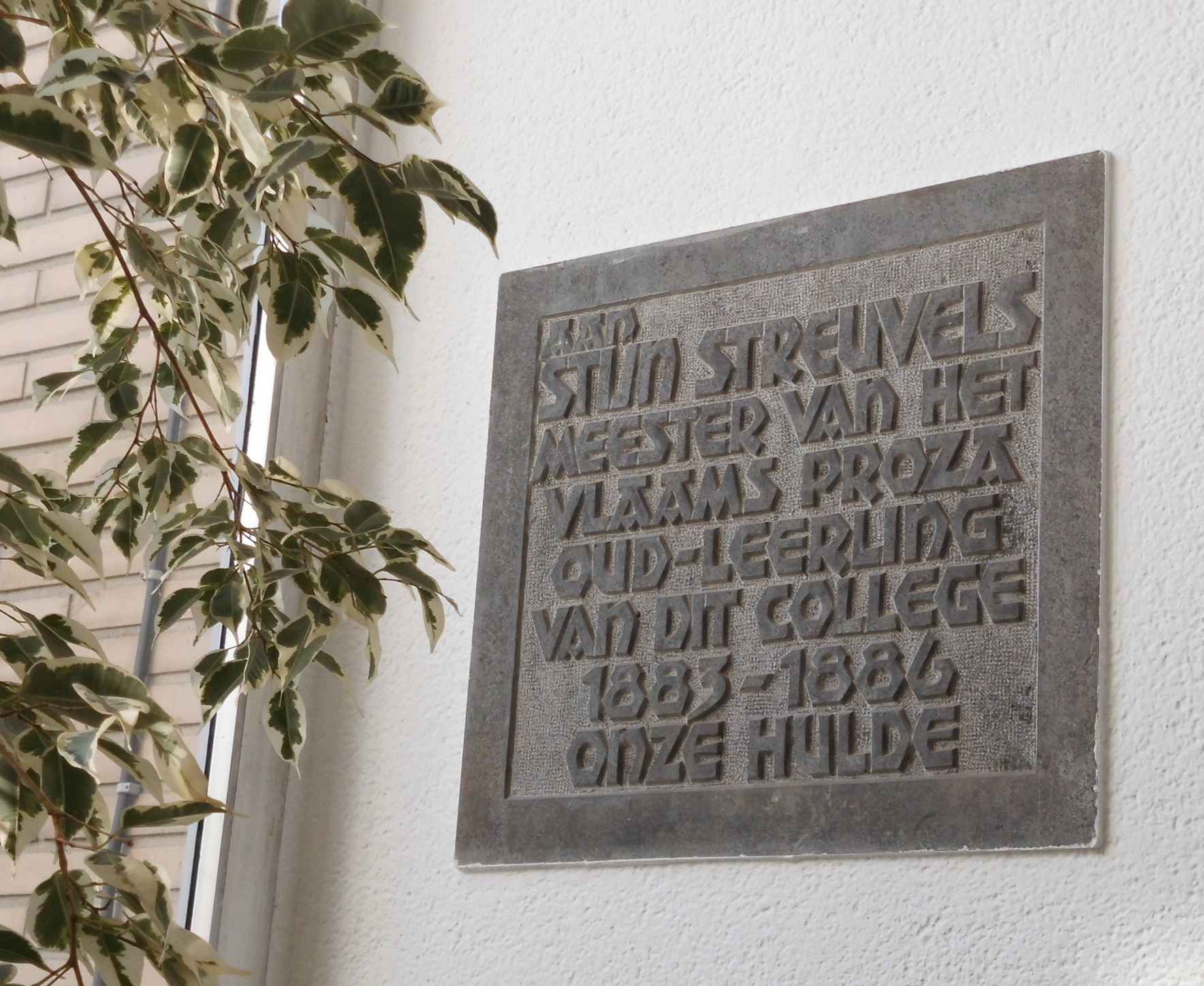 Herdenkingssteen Stijn Streuvels - inkomhal Sint-Jan-Berchmanscollege - Kasteelstraat - Avelgem - West-Vlaanderen - Begië